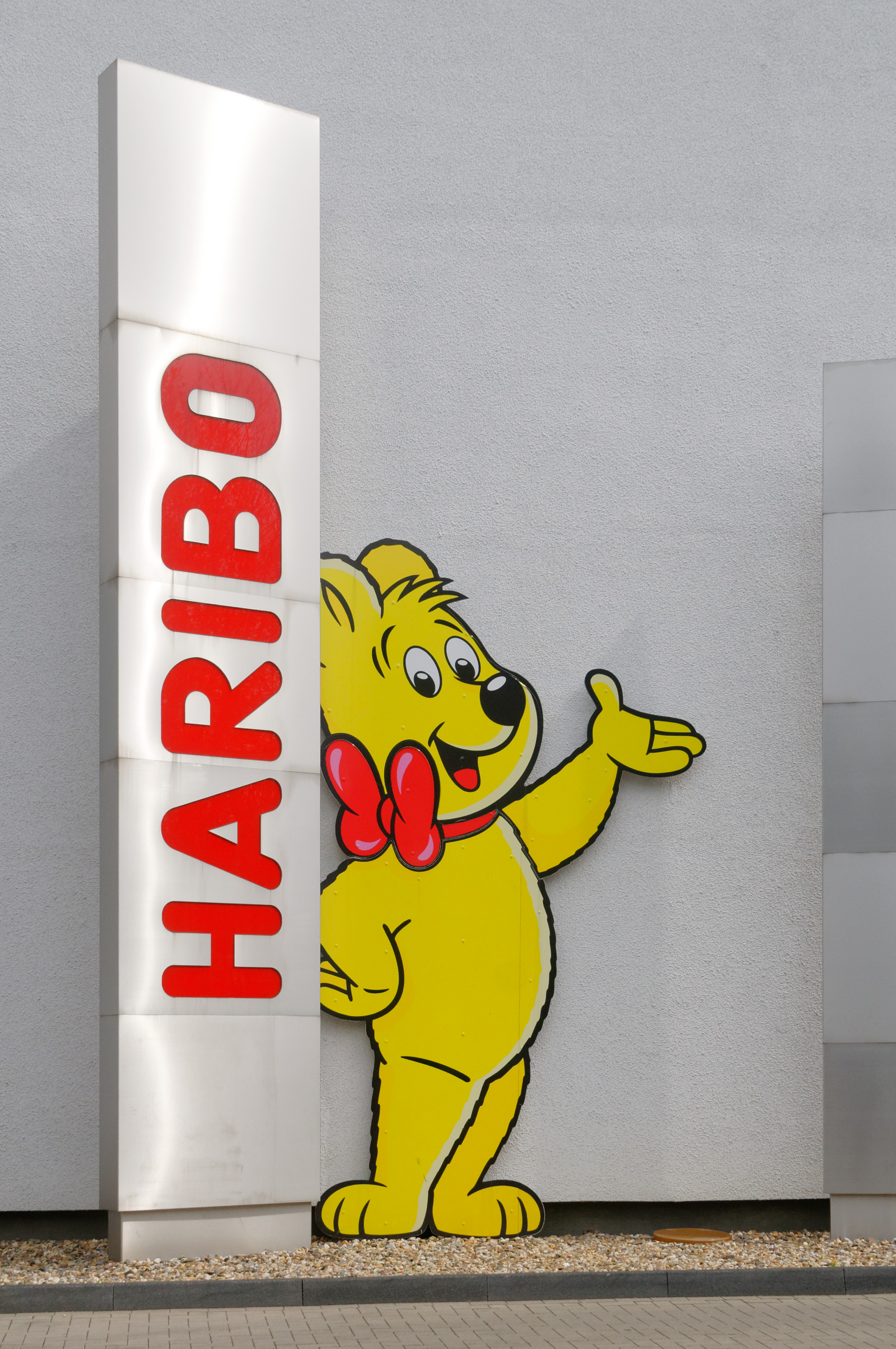 Goldbär vor dem Werksgelände von Haribo in Solingen